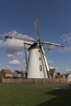 foto Kempens Landschap